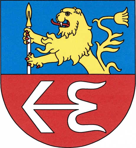 znak, Horní Heřmanice, okres Třebíč